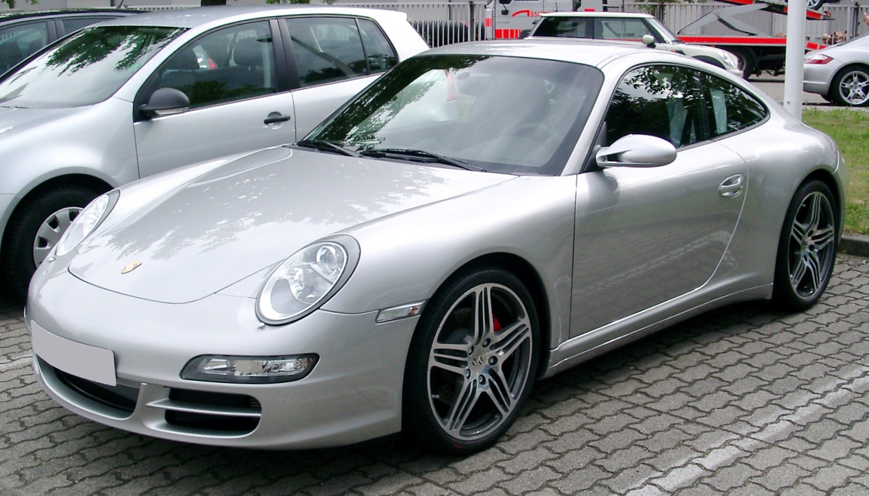 Porsche Carrera 4S